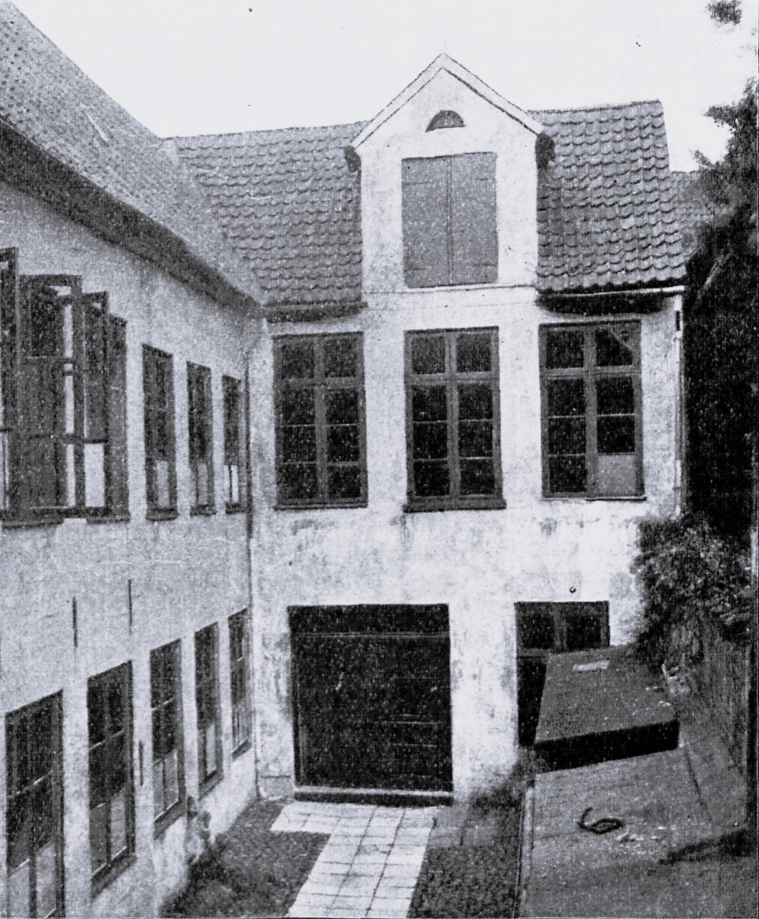 Von 1903 bis 1907 das Unterrichtslokal des Präparandeums in der Beckergrube 53. Davor Sitz der Grothe-Schule.